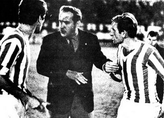 Osvaldo Zubeldía, en funciones como director técnico de Estudiantes de La Plata.